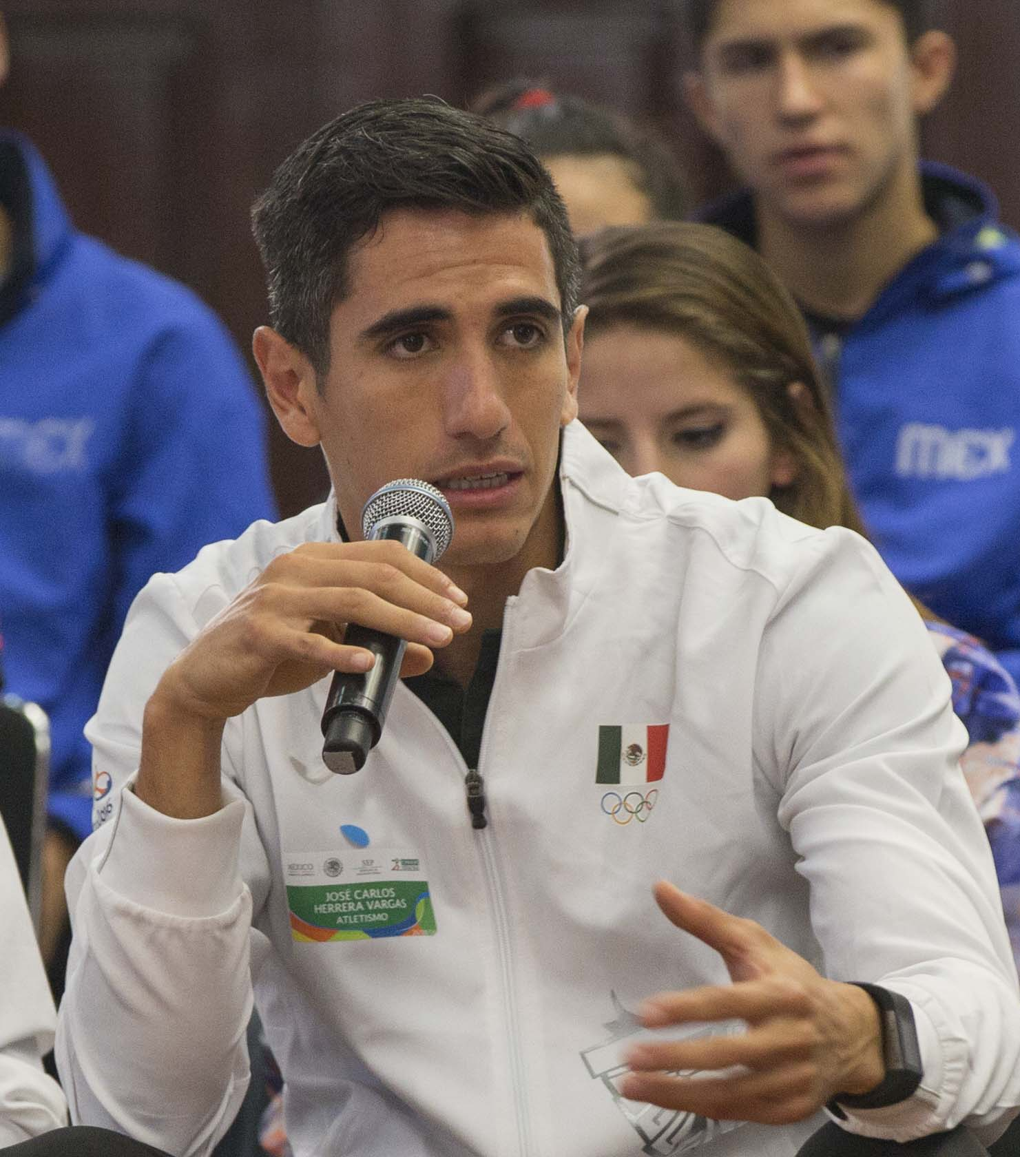 El Presidente Enrique Peña Nieto se reunió hoy con los deportistas que integraron la delegación mexicana que participó en los Juegos Olímpicos de Río de Janeiro 2016, a quienes les expresó su reconocimiento por el esfuerzo, la entrega, el empeño y el coraje que demostraron en esta justa olímpica y durante el proceso para llegar a ella.